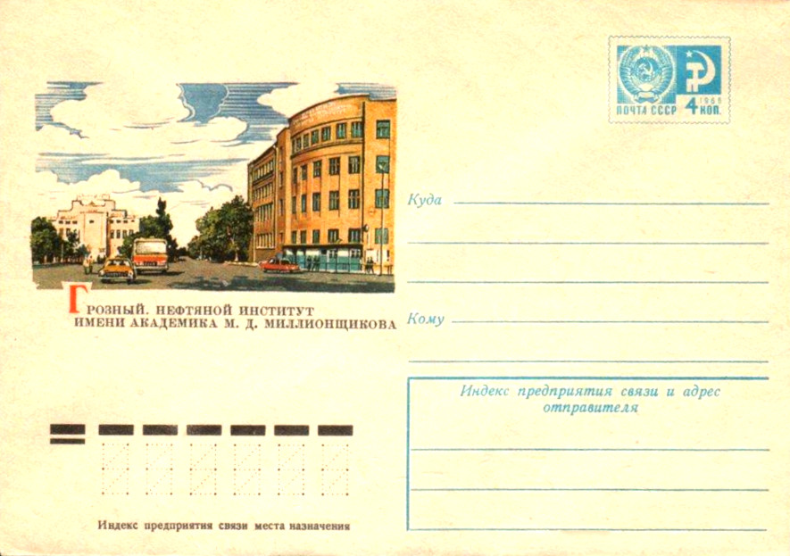 Грозный, институт им. Миллионщикова. 1976 год